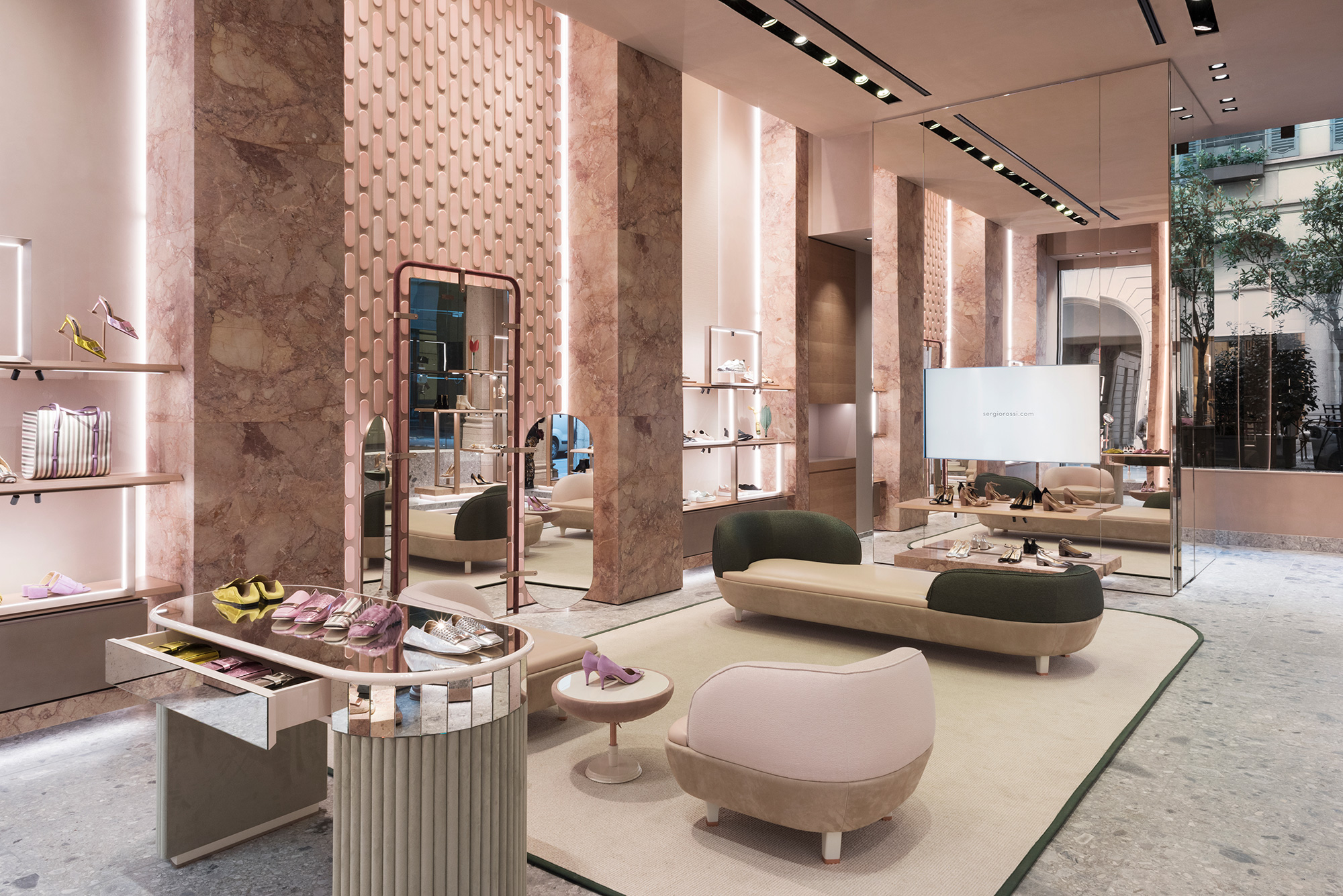 Sergio Rossi nuovo store concept, 2017